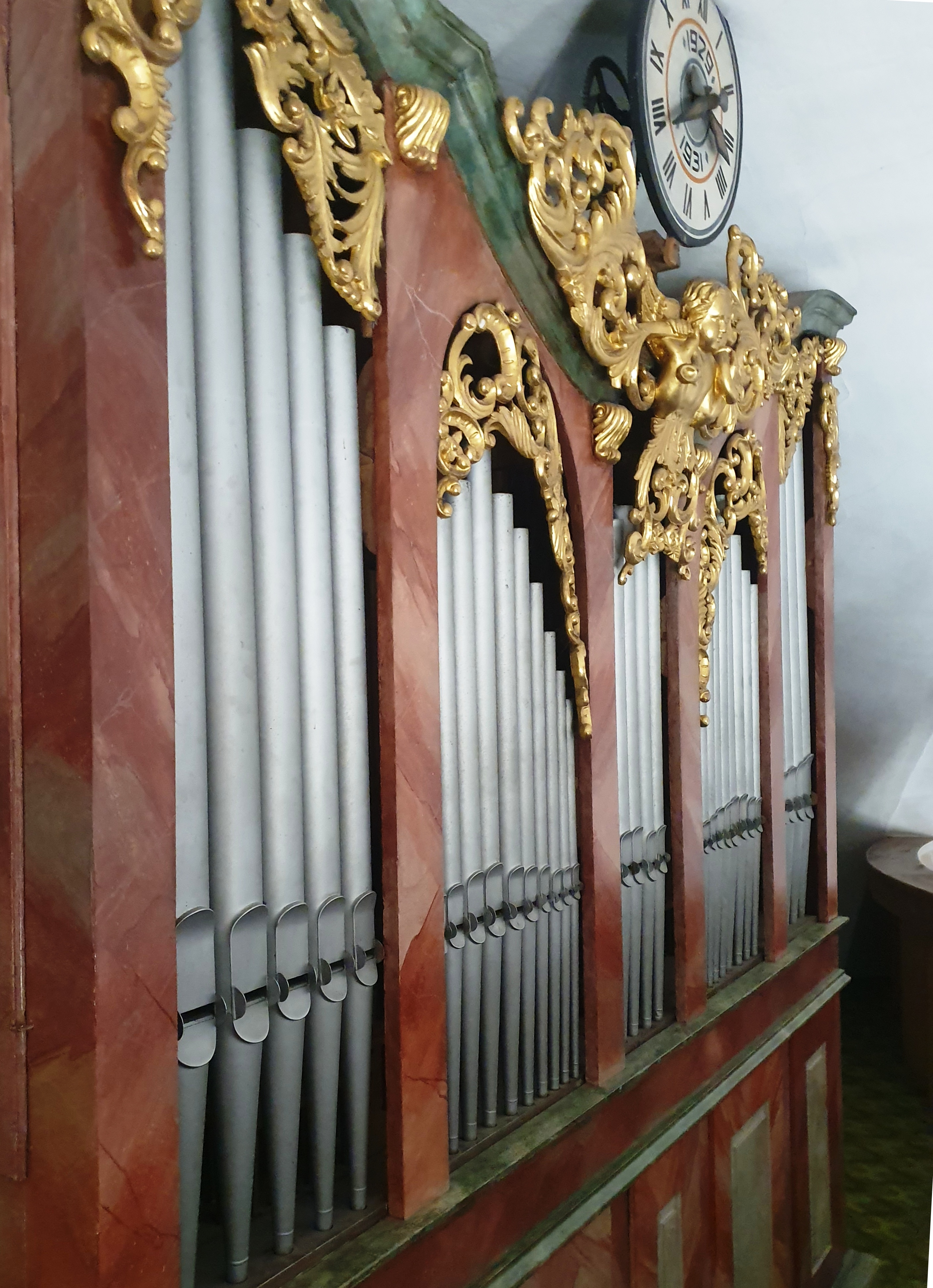 Ludwig Mooser Orgel 1857